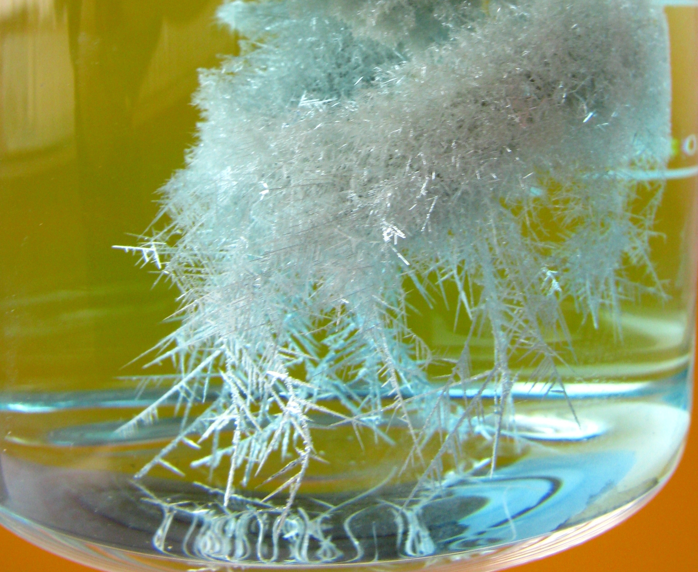 Arbre de Diane réalisé avec un fil de cuivre dans une solution de nitrate d'argent dans un bécher. Après 2 heures dans une solution à 0,1 mol/L, L'Arbre est à un stade extrêmement avancé. Proche de l'effondrement, l'Arbre est très fragile. On voit nettement que la solution est maintenant bleutée : cela est dû aux ions Cu2+ apparus au cours de la réaction.